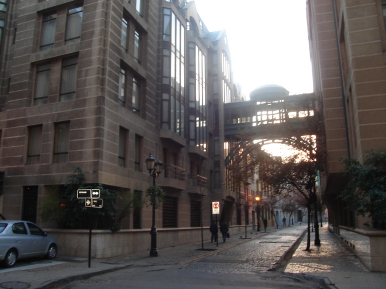 Imagen de la intersección de las calles Serrano y París, en el barrio París-Londres, en Santiago de Chile. Fotografía tomada por Usuario:Der schöne Tod